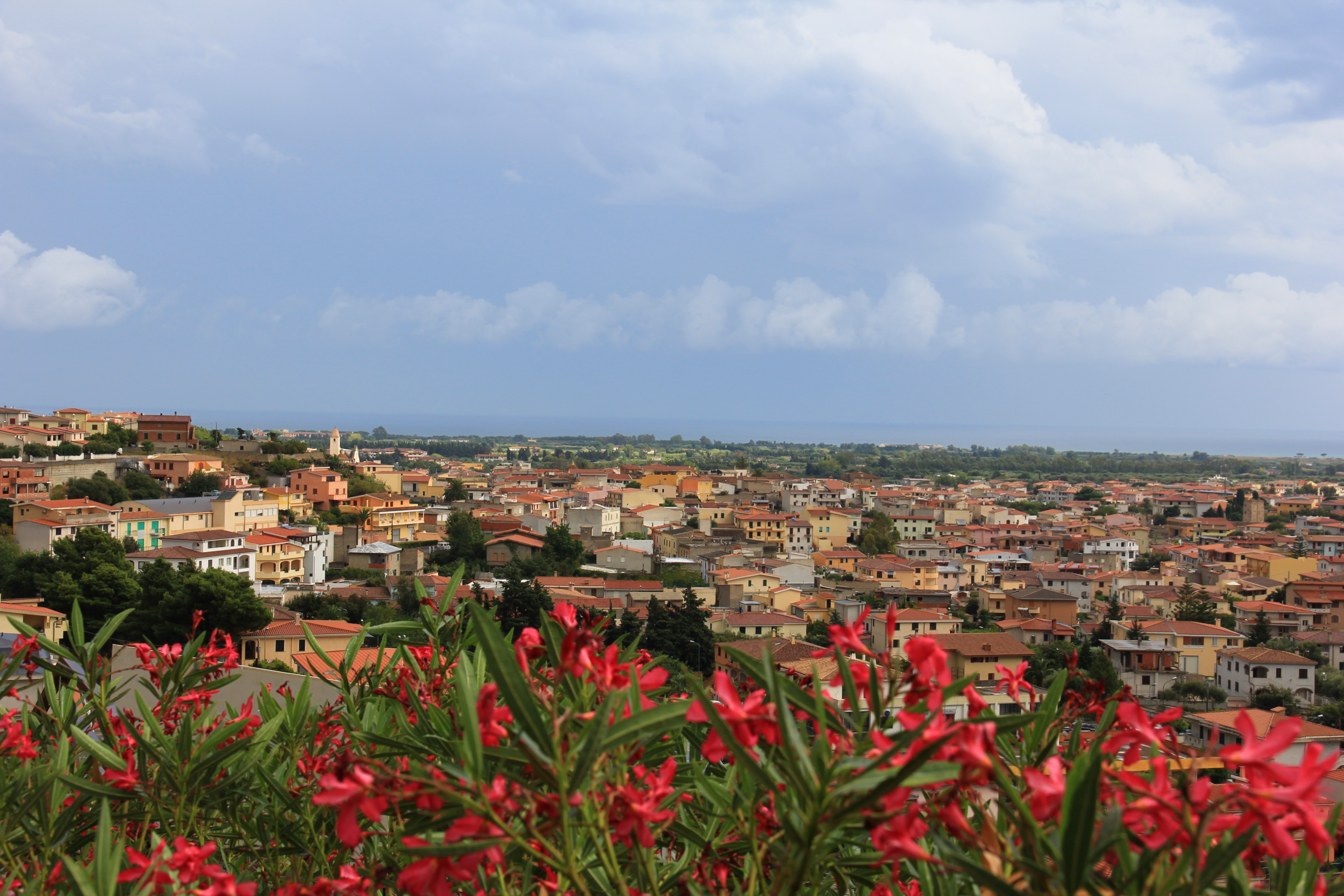 Panorama